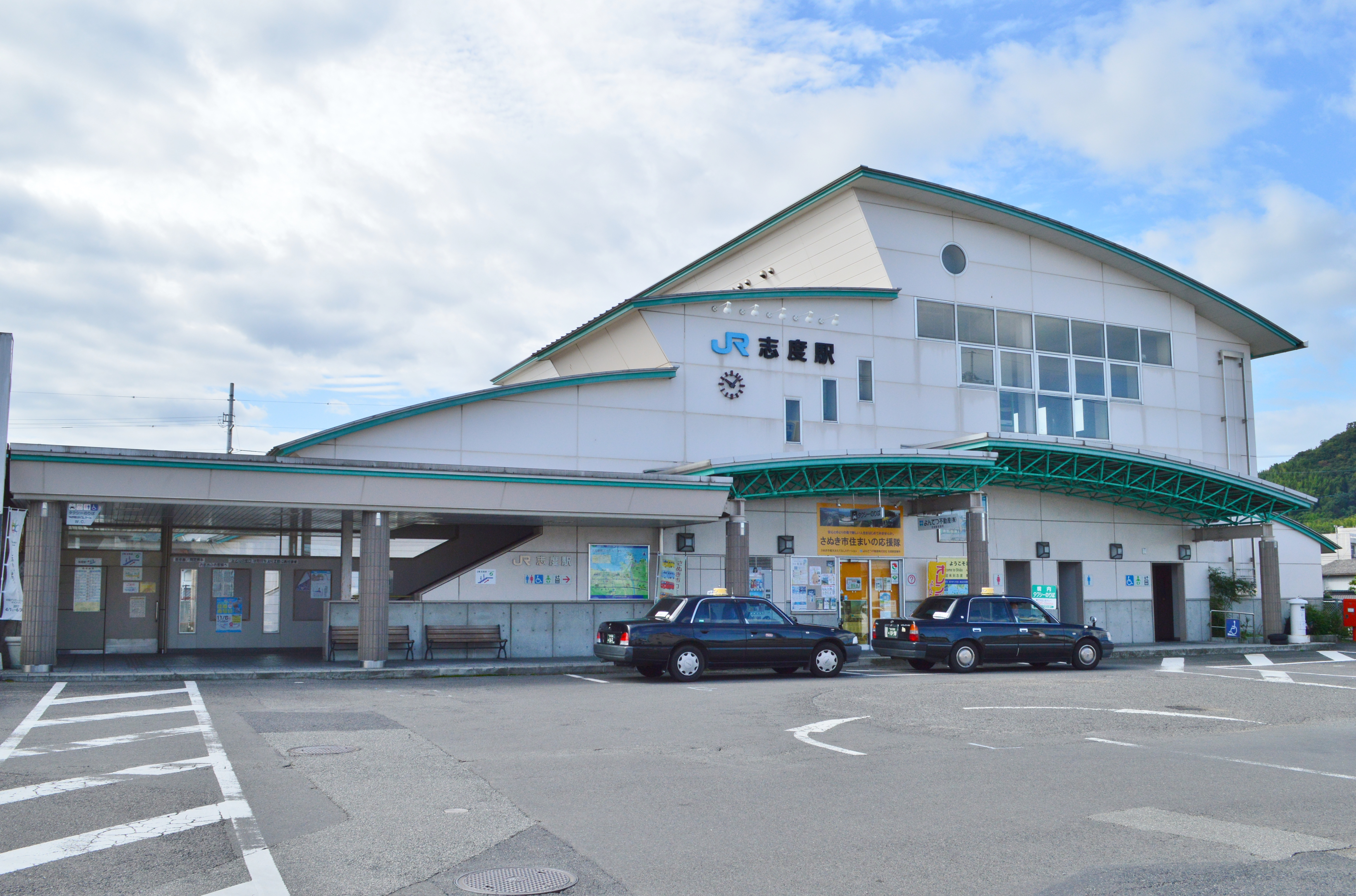 志度駅 駅舎